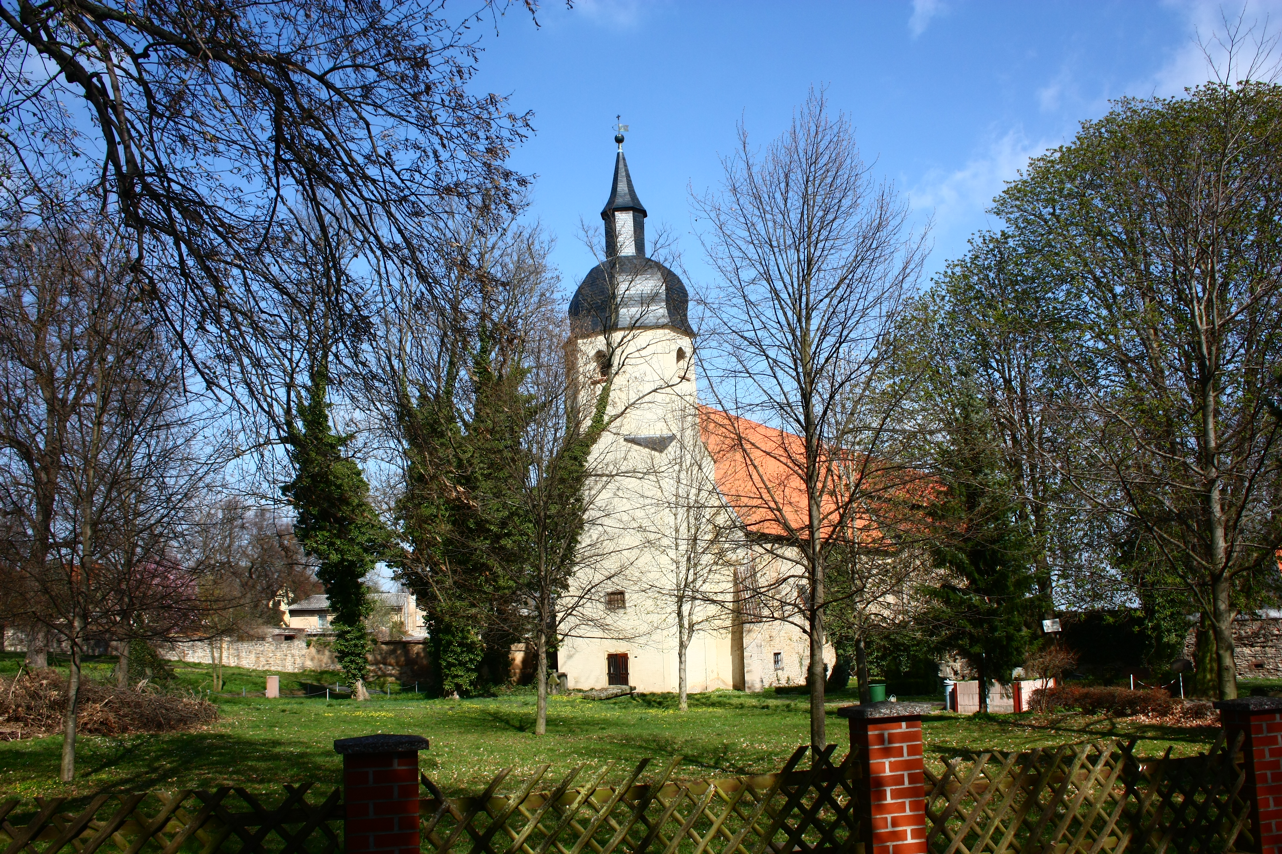 die Dorfkirche von Wiederstedt